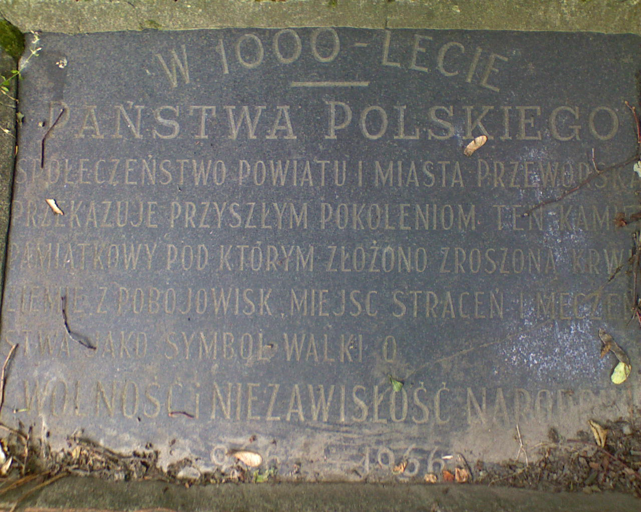 Inskrypcja na tablicy 1000-lecia Państwa Polskiego z 1966 r. na terenie Parku Przeworsku.